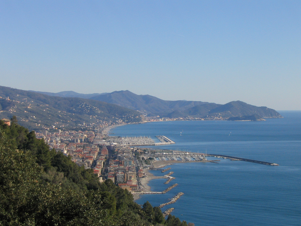 Panorama dalle Grazie di Chiavari e Lavagna